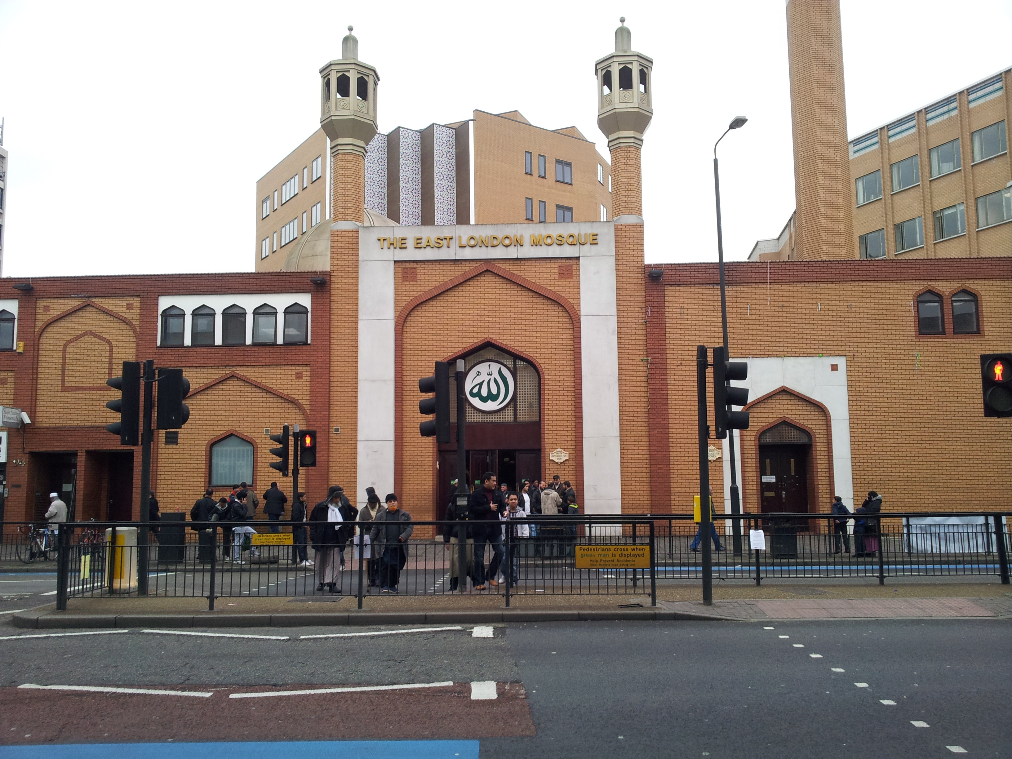 East London Mosque